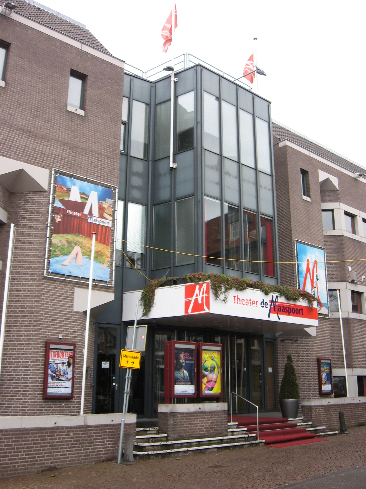 Venlo